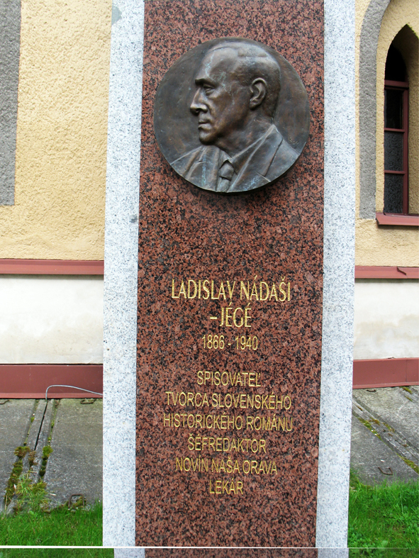 Reliéf Ladislava Nádašiho Jégého v Parku dejateľov v Dolnom Kubíne